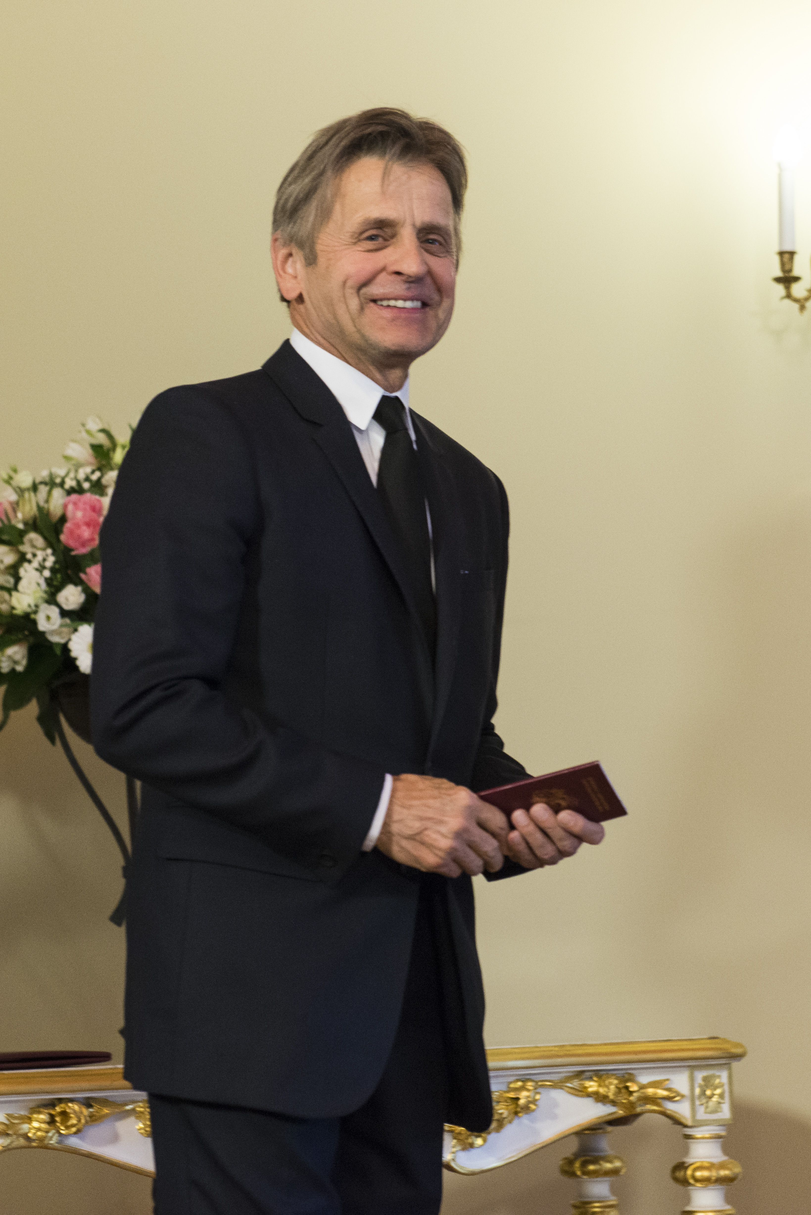 2017.gada 27.aprīlis. Svinīgā Latvijas pilsoņa pases pasniegšana Mihailam Barišņikovam. Foto: Reinis Inkēns, Saeimas Administrācija Izmantošanas noteikumi: saeima.lv/lv/autortiesibas